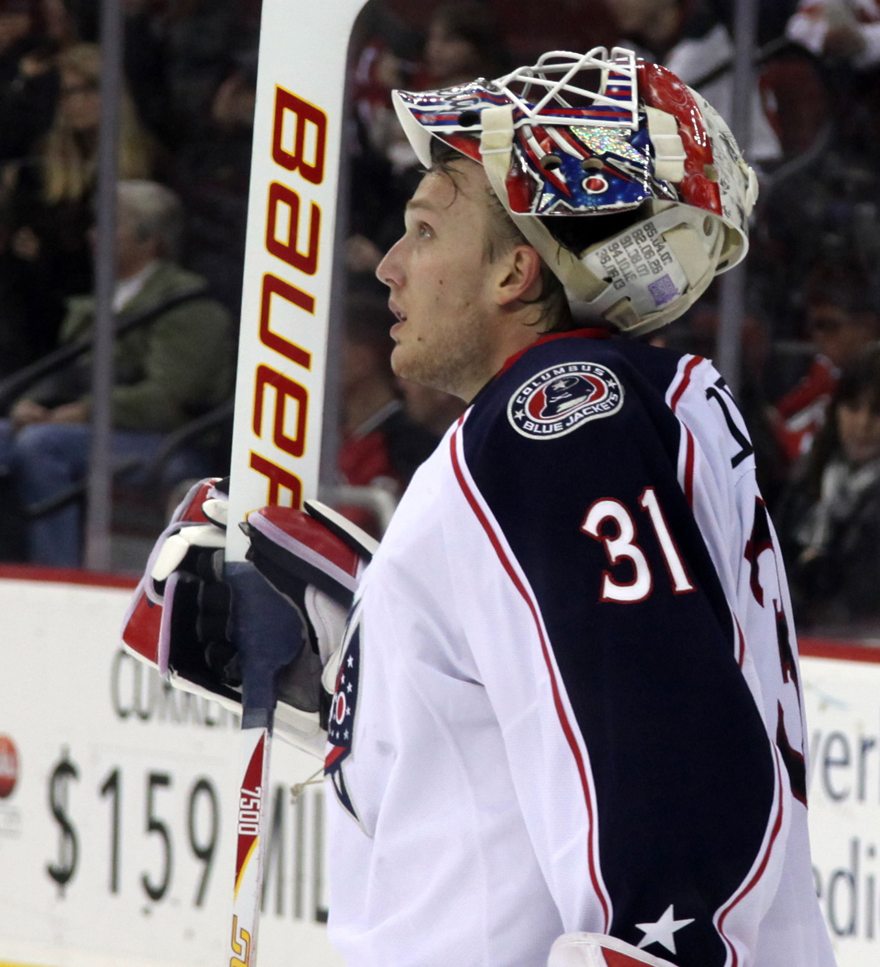 Forsberg in November 2014.